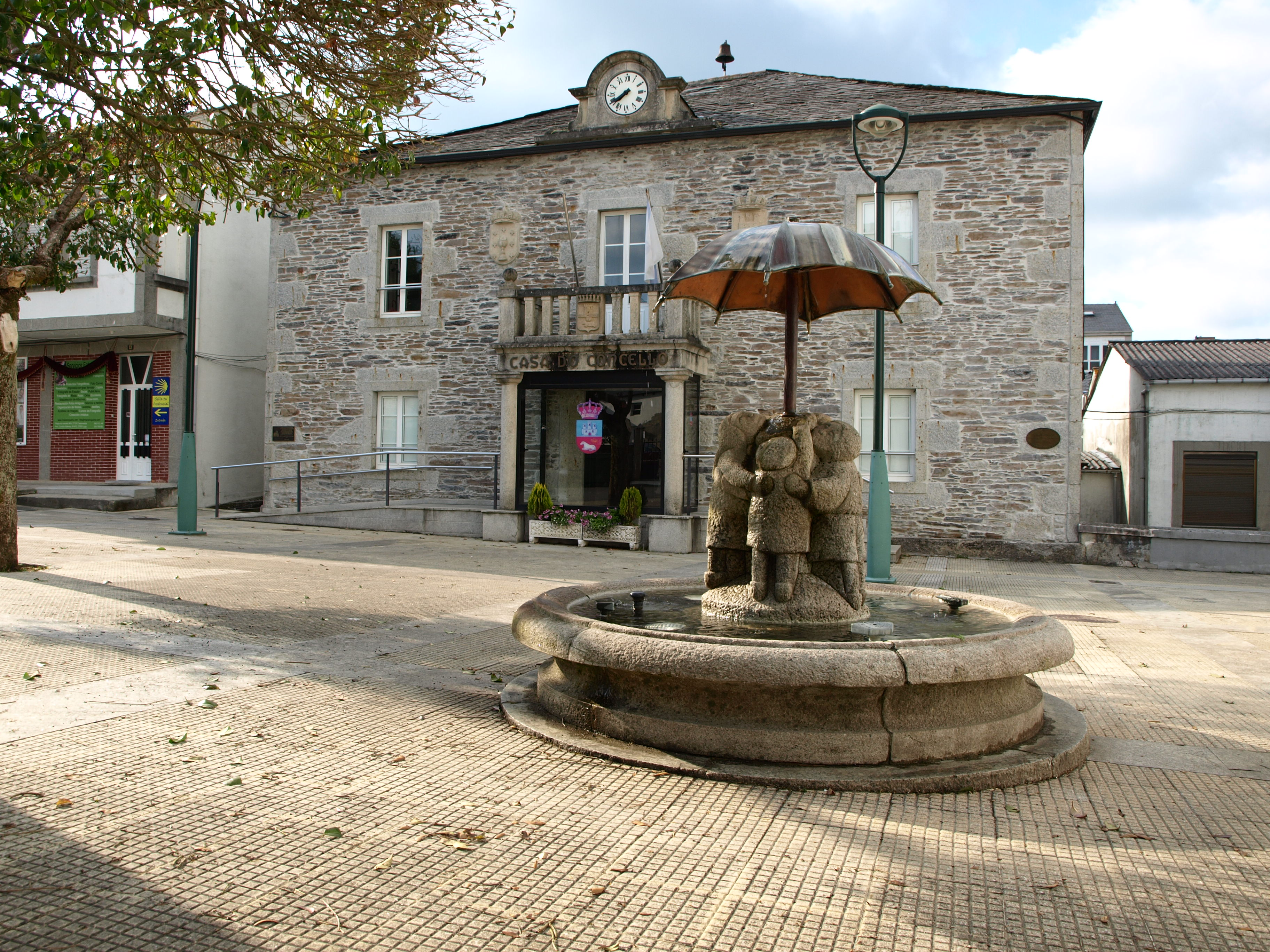 Praza do Concello de Castroverde. Fonte